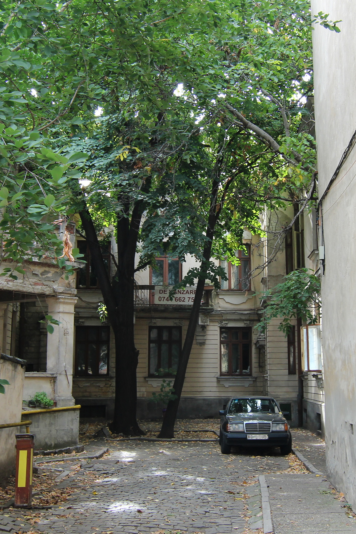 Casă pe Stelea Spătarul